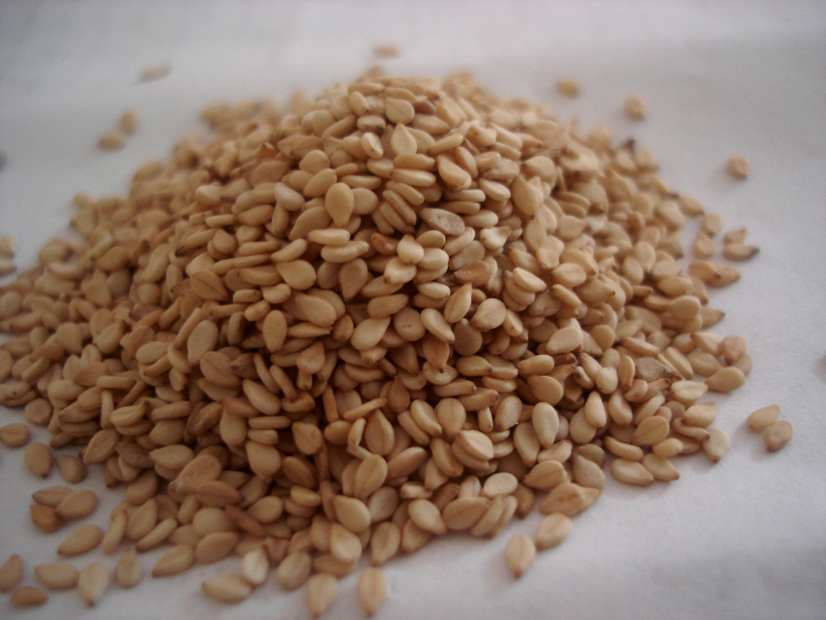 എള്ള്